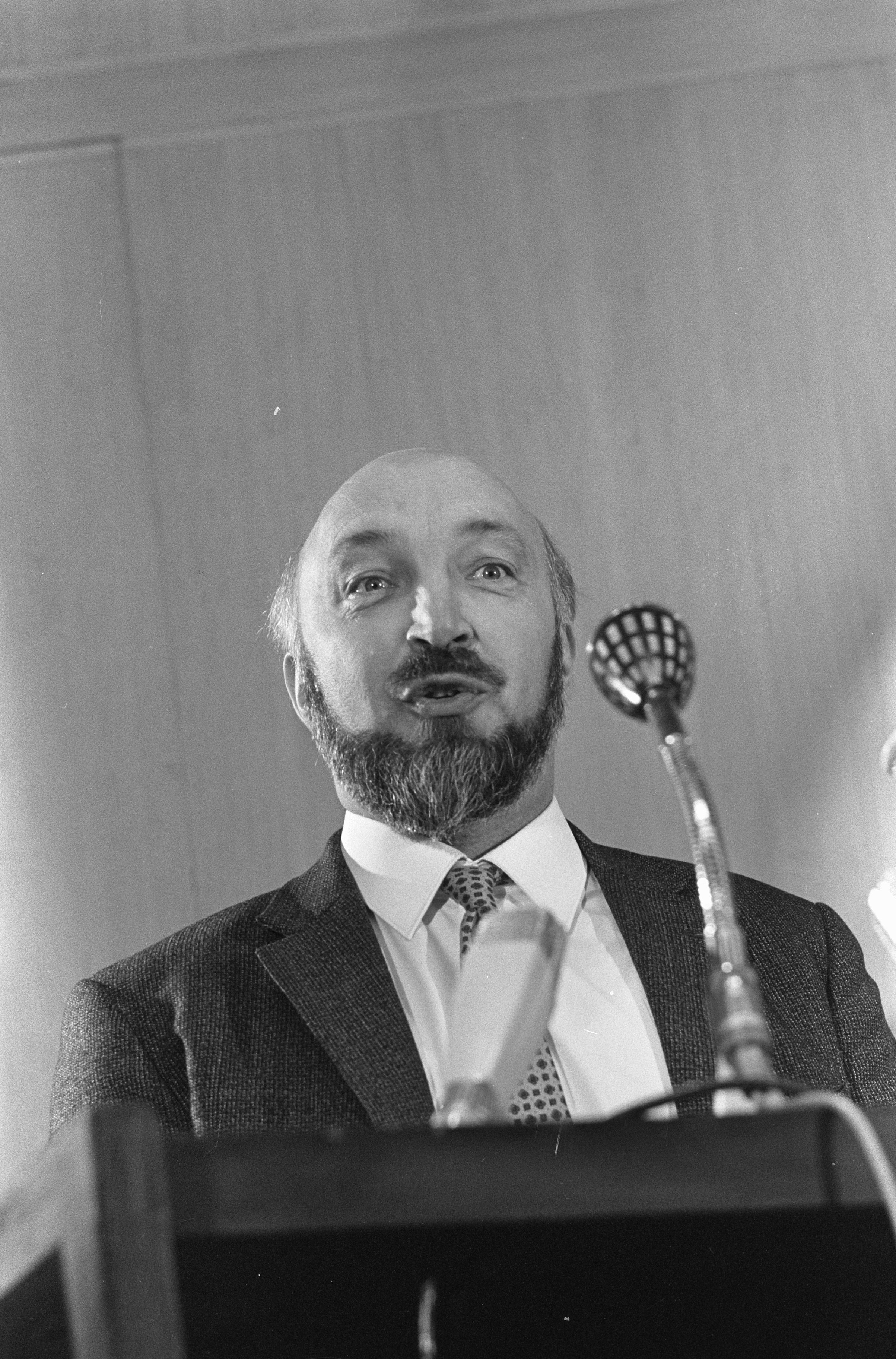 Collectie / Archief : Fotocollectie Anefo Reportage / Serie : [ onbekend ] Beschrijving : Prof. dr. Piet Thoenes Datum : 25 september 1966 Trefwoorden : academici, portretten Persoonsnaam : Thoenes, Piet Fotograaf : Kroon, Ron / Anefo Auteursrechthebbende : Nationaal Archief Materiaalsoort : Negatief (zwart/wit) Nummer archiefinventaris : bekijk toegang 2.24.01.05 Bestanddeelnummer : 919-5990